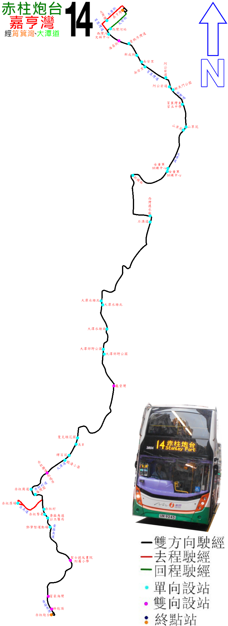 中文（香港）: 新巴14線的走線圖